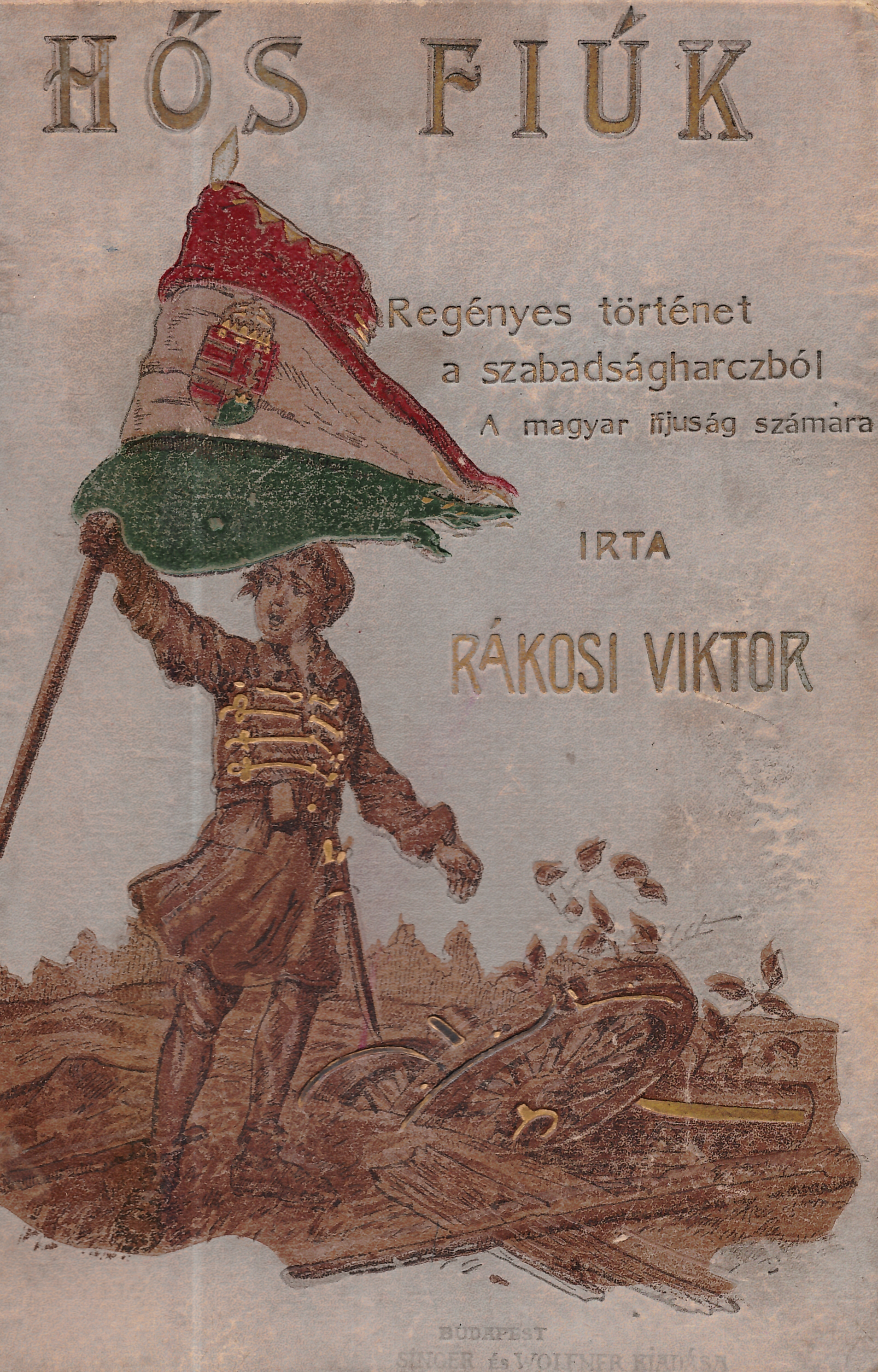 Rákosi Viktor (1860-1923): Hős fiúk (1900)